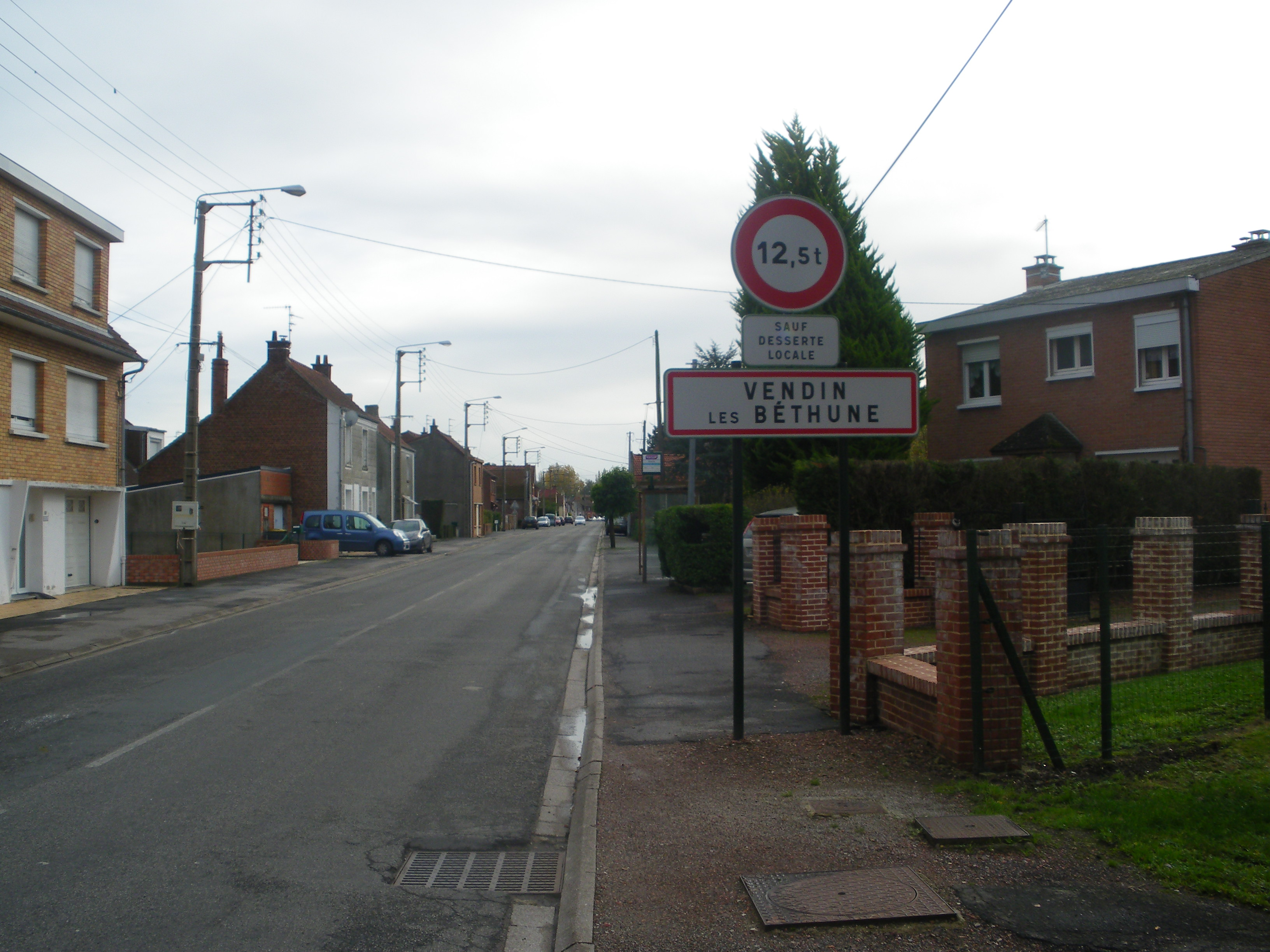 Panneau d'entrée de la commune de Vendin-lès-Béthune.